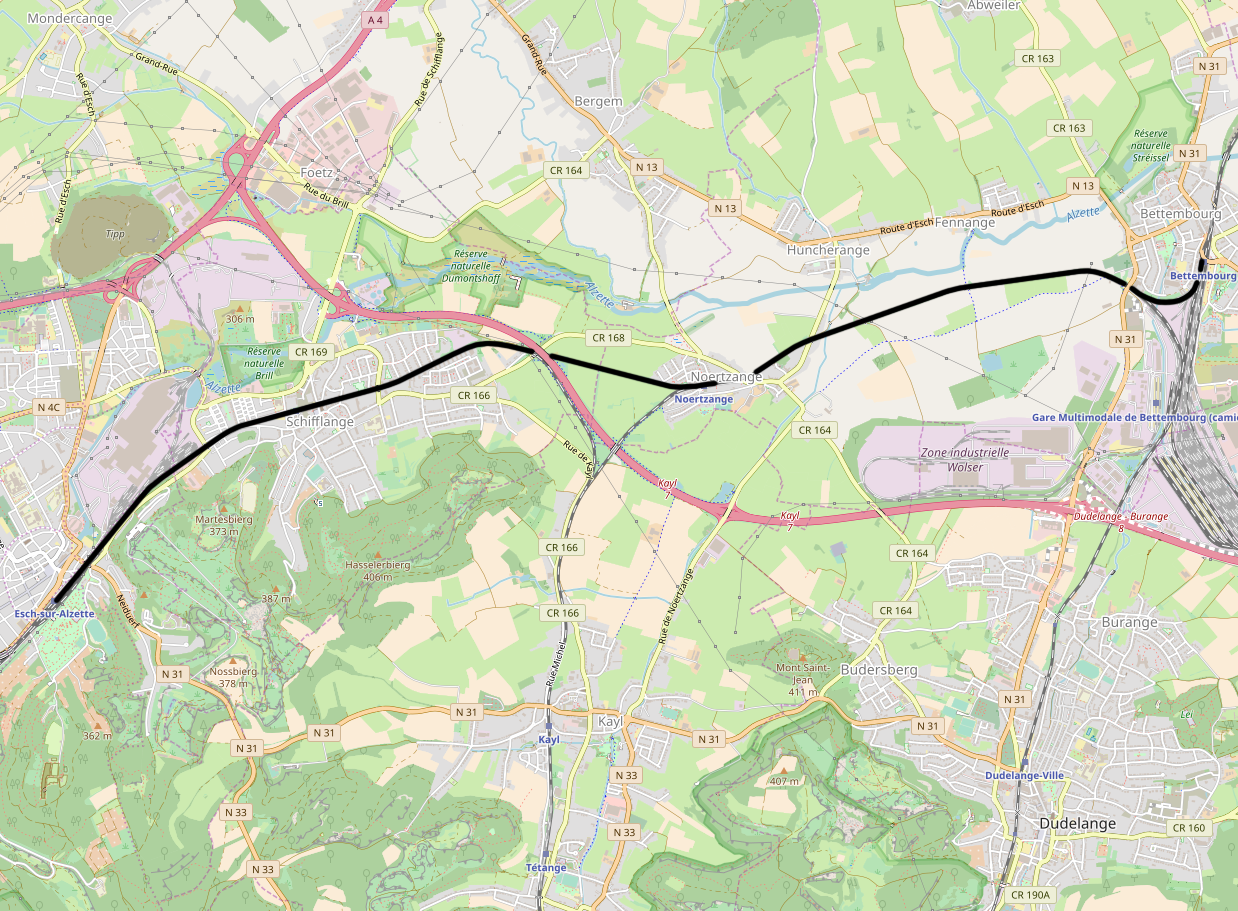 CFL line 6a, Bettembourg - Esch-sur-Alzette